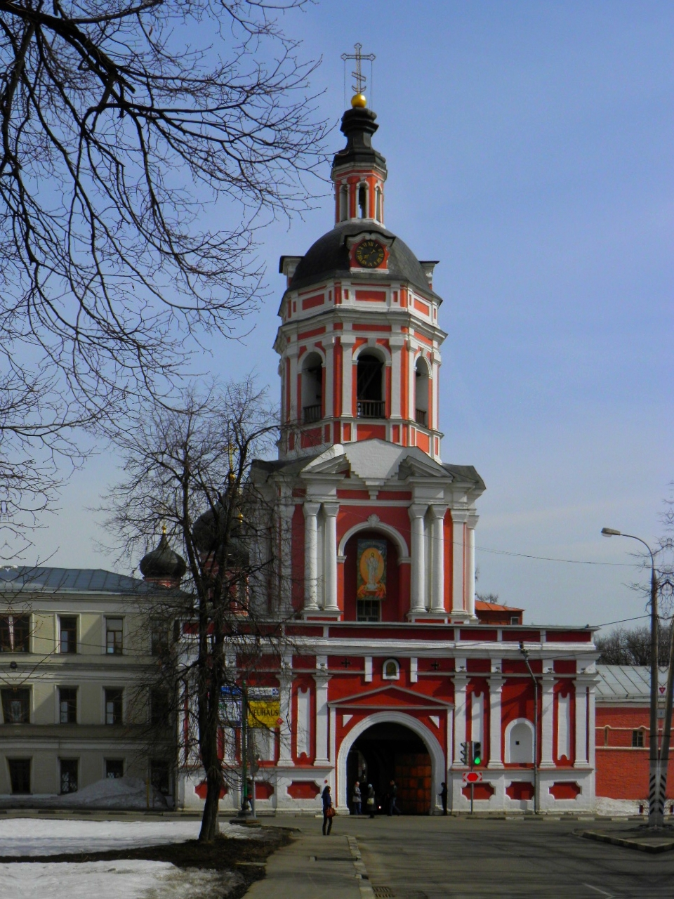 ворота в ХРАМ